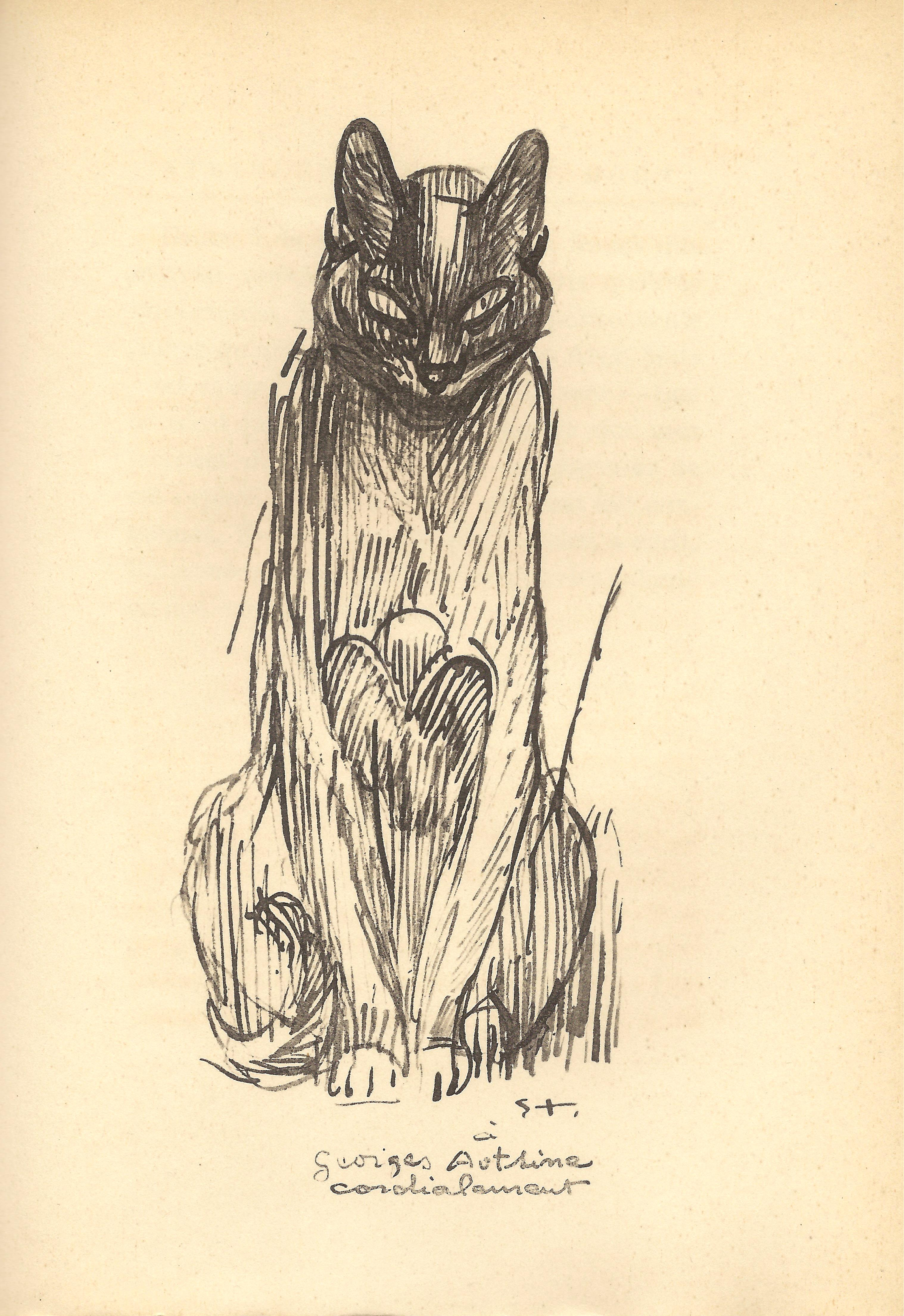 Dessin de Théophile Alexandre Steinlen (1859-1923) reproduit dans le livre de Claude Aveline, "Les Muses mêlées", 1926